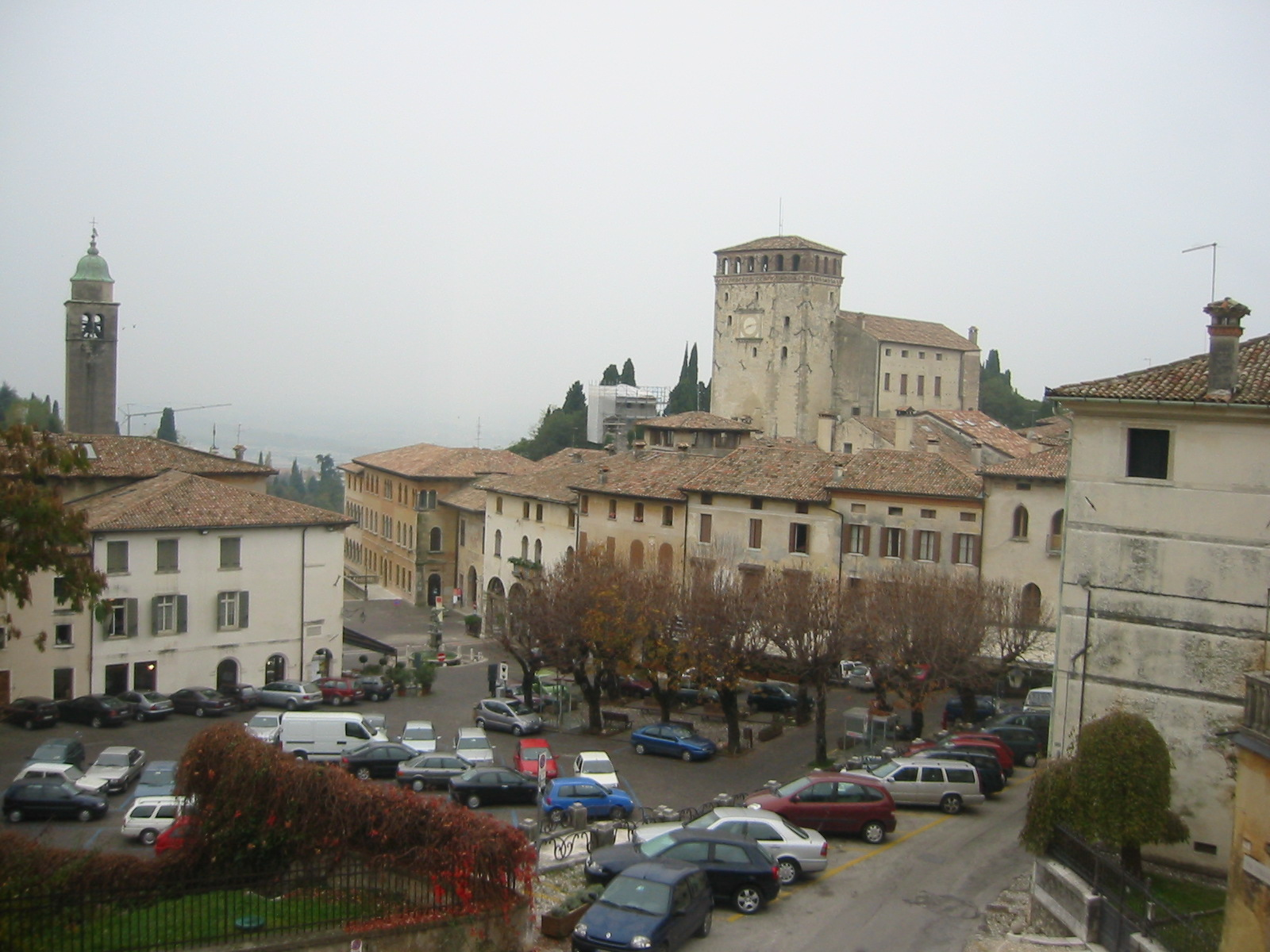 Asolo, Veneto, ItaliaAsolo